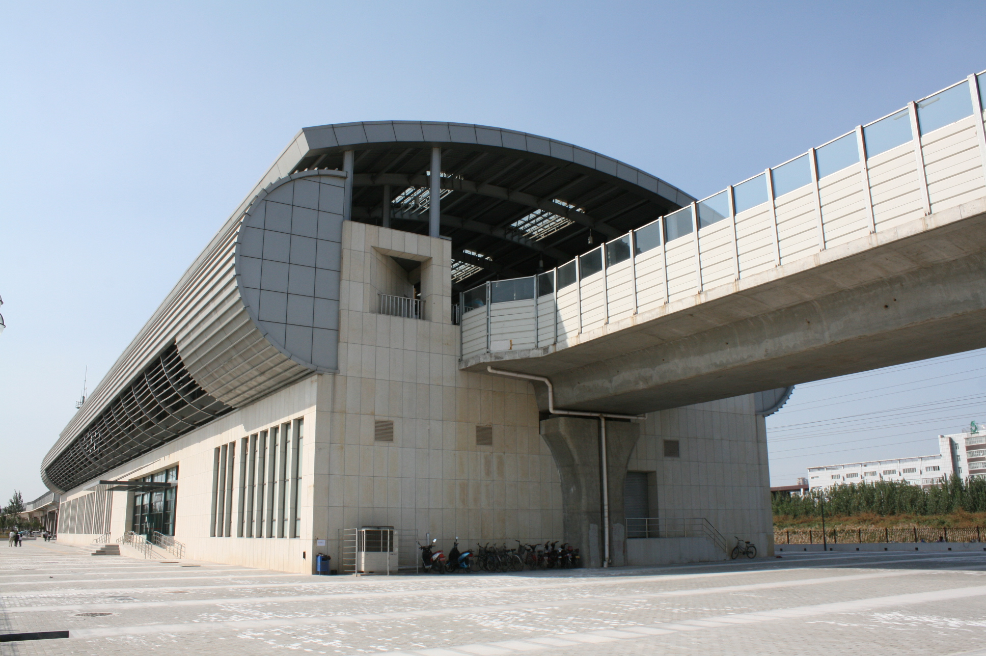 天津地铁3號線南端終點站高新区站站體